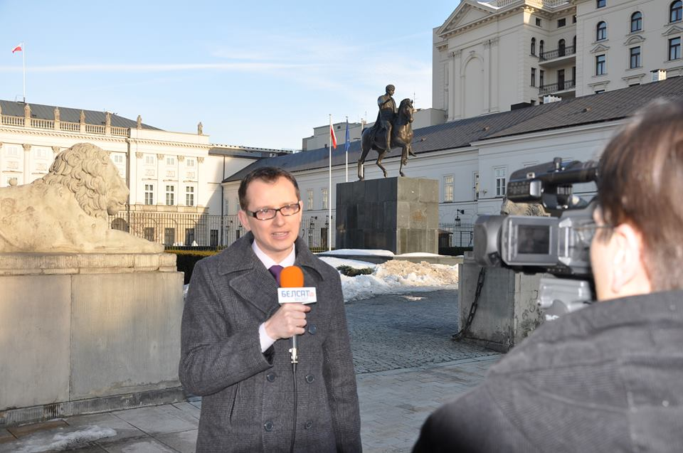 Siarhiej Padsasonny - mieszkający w Polsce białoruski dziennikarz, działacz na rzecz LGBT i filolog, redaktor główny bloku informacyjnego telewizji Biełsat TV.